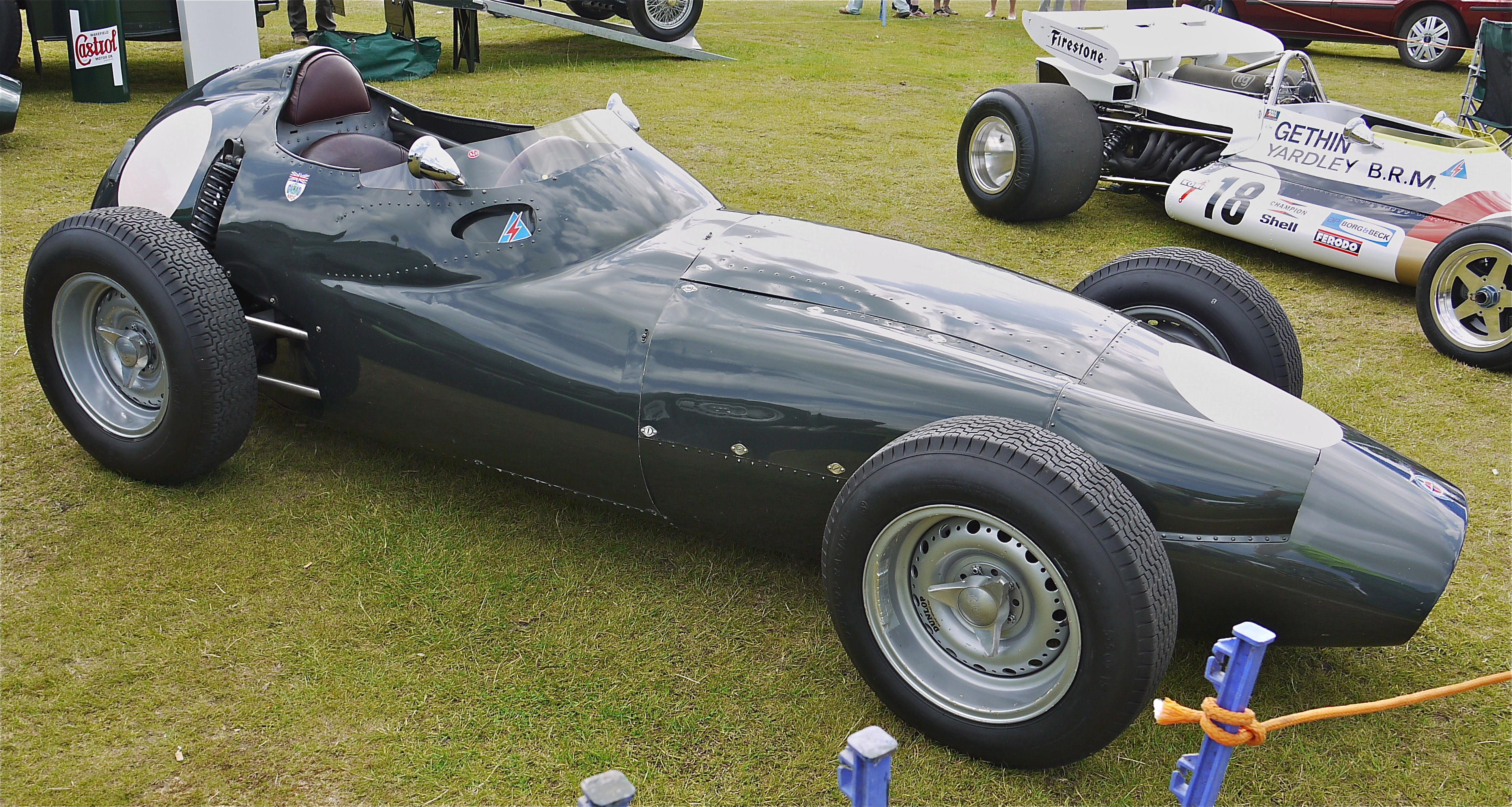 Panasonic G1 14-45 Lens